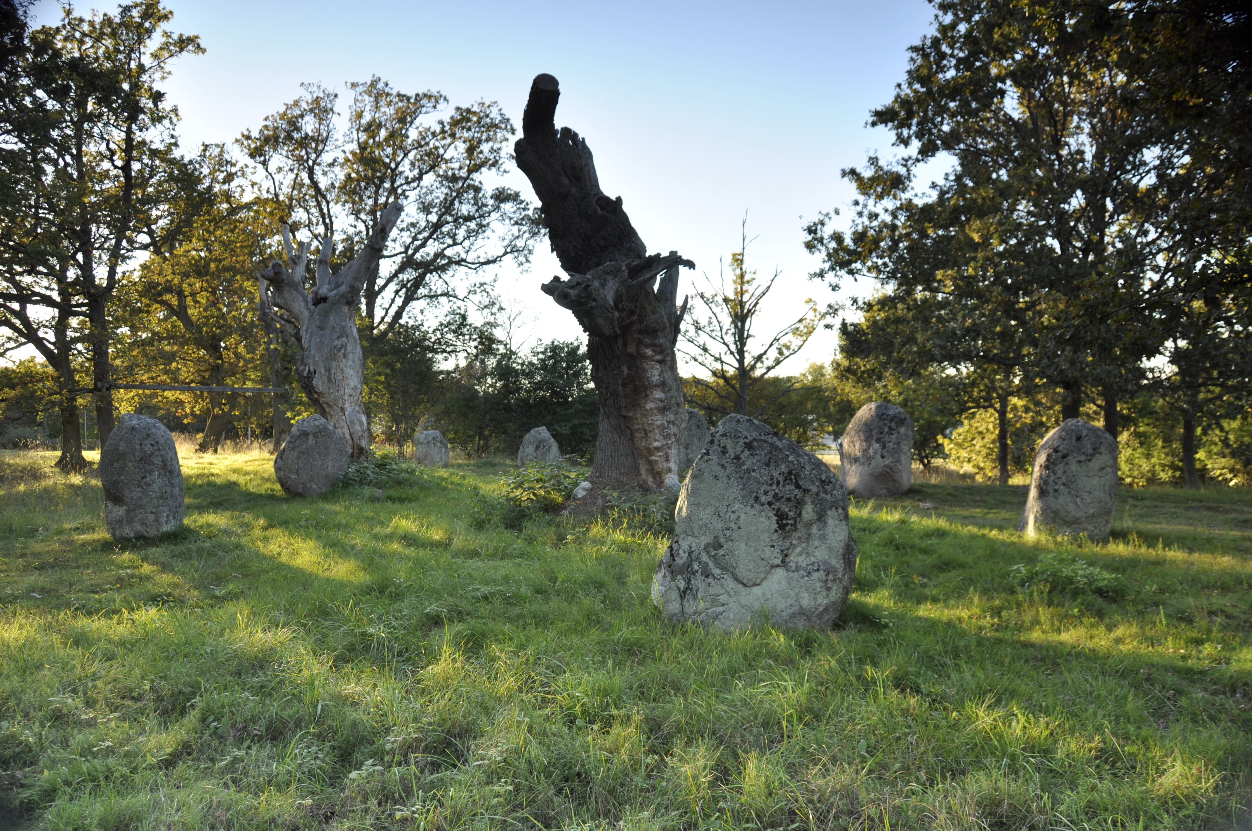 Domarring i Fölehagen, Kalmar.